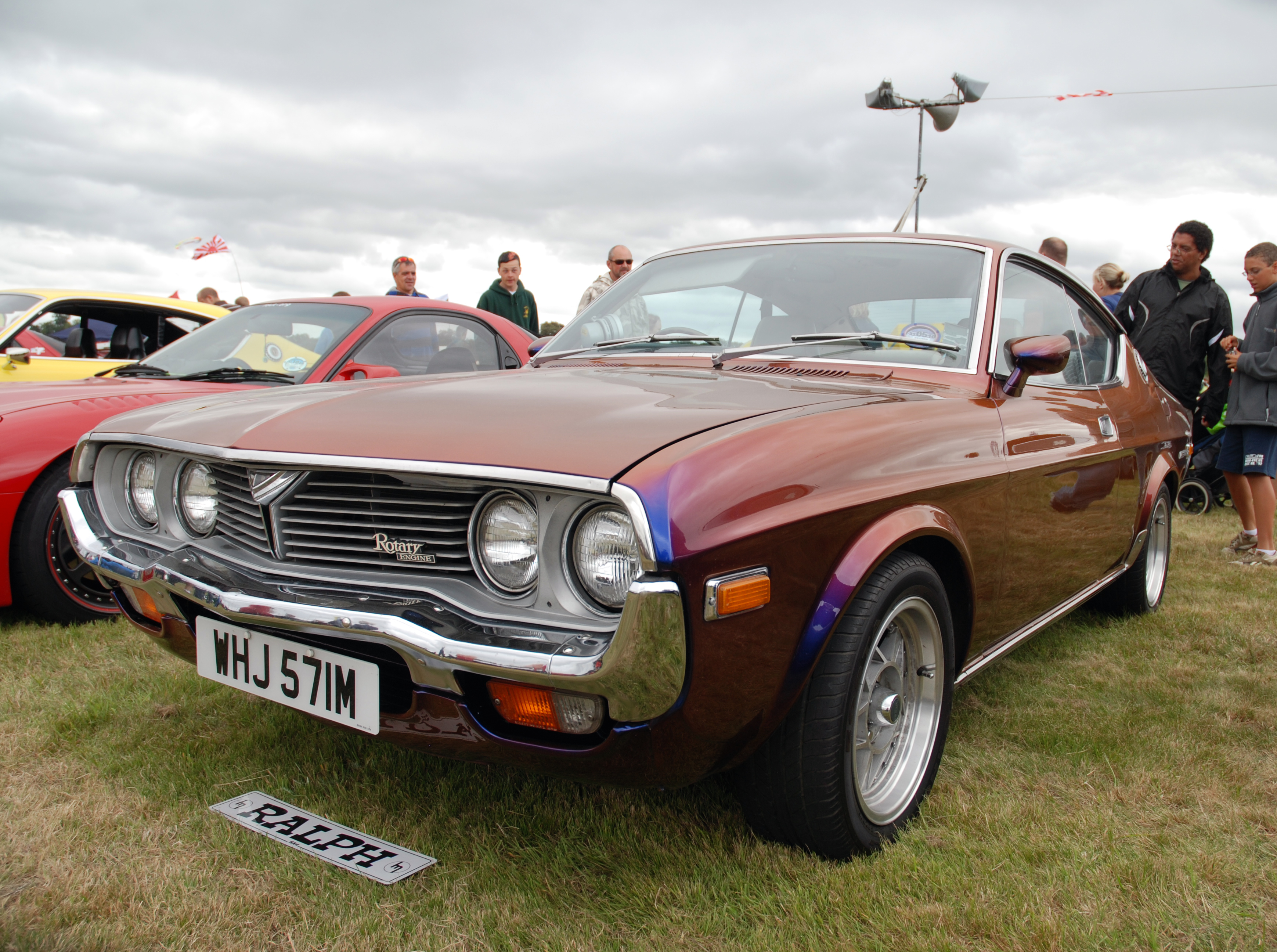 Dunsfold,Aug 2009